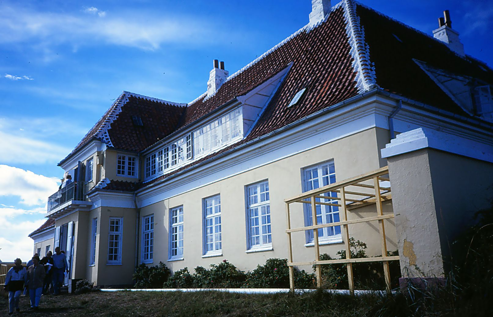 Klitgården set fra sø-siden. Foto fra den 7. september 1997 hvor kongefamilien netop har afhændet villaen.